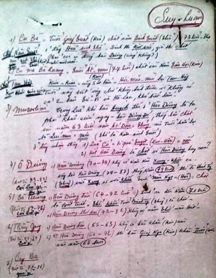 HLCom2